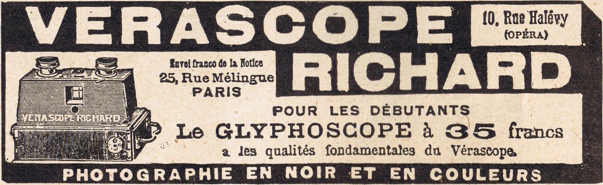 Publicité pour l'appareil photo stéréoscopique Glyphoscope publiée dans le journal l'illustration.